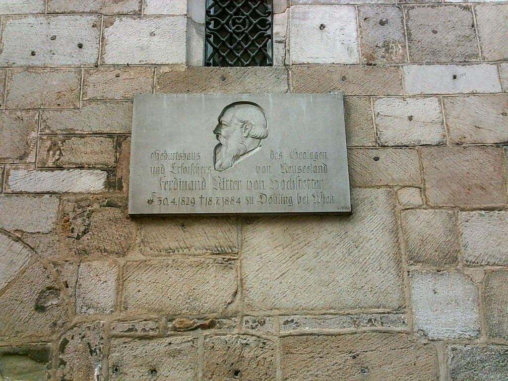 Gedenktafel für Ferdinand Ritter von Hochstetter (1829 - 1884) am ehemaligen Speyrer Pfleghof in Esslingen, heute Sitz der Sektkellerei Kessler